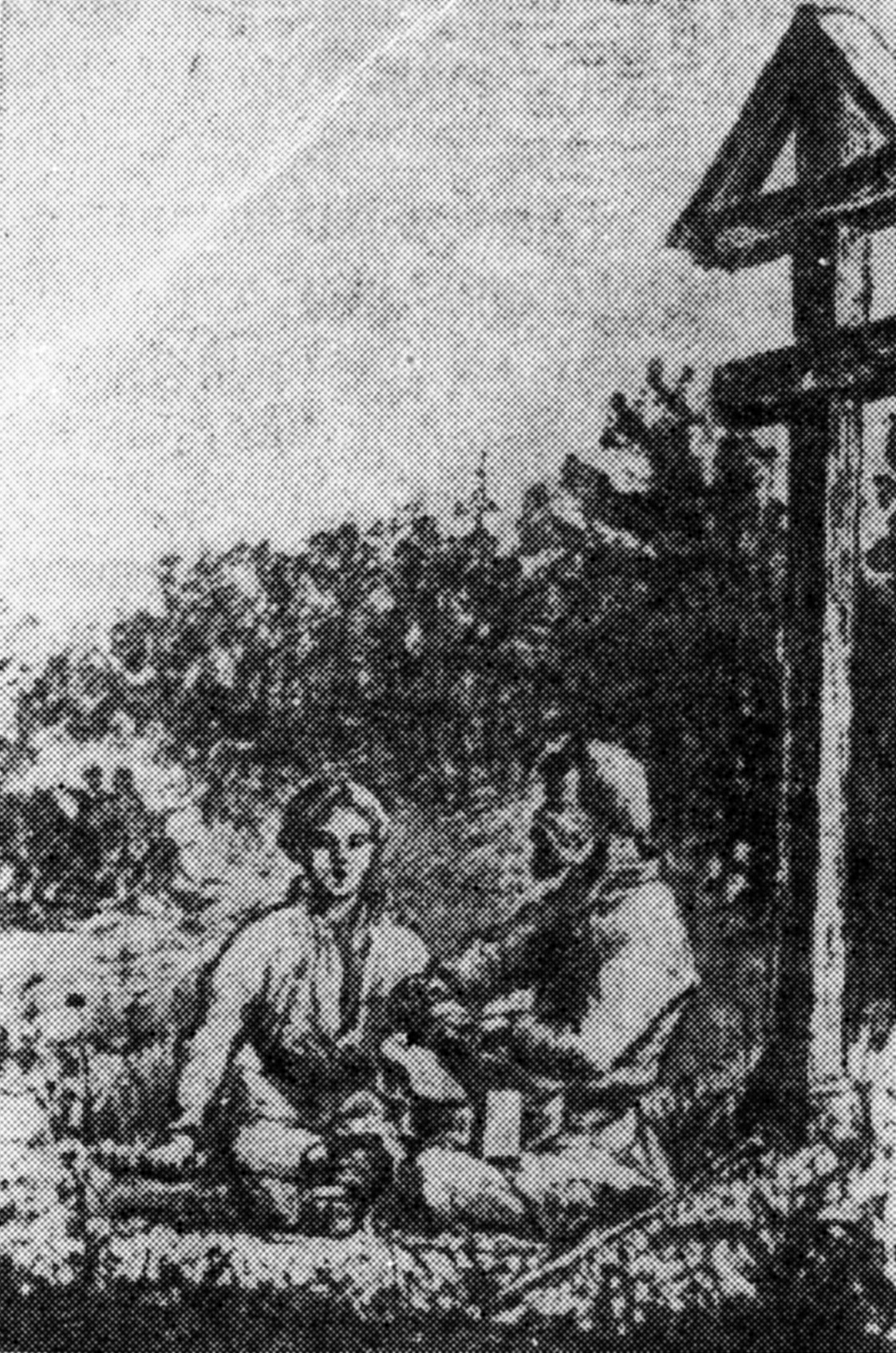 Беларуская (тарашкевіца): Малюнак беларускага паэта і празаіка Каруся Каганца (Казімера Кастравіцкага) «На ростаньках» (туш)